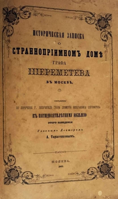 Обложка книга А. Т. Тарасенкова "Историческая записка о Странноприимном Доме графа Шереметева"